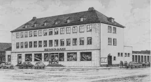 Neubau der Hauptstelle in der WermelskirchenTelegrafenstraße (1953)